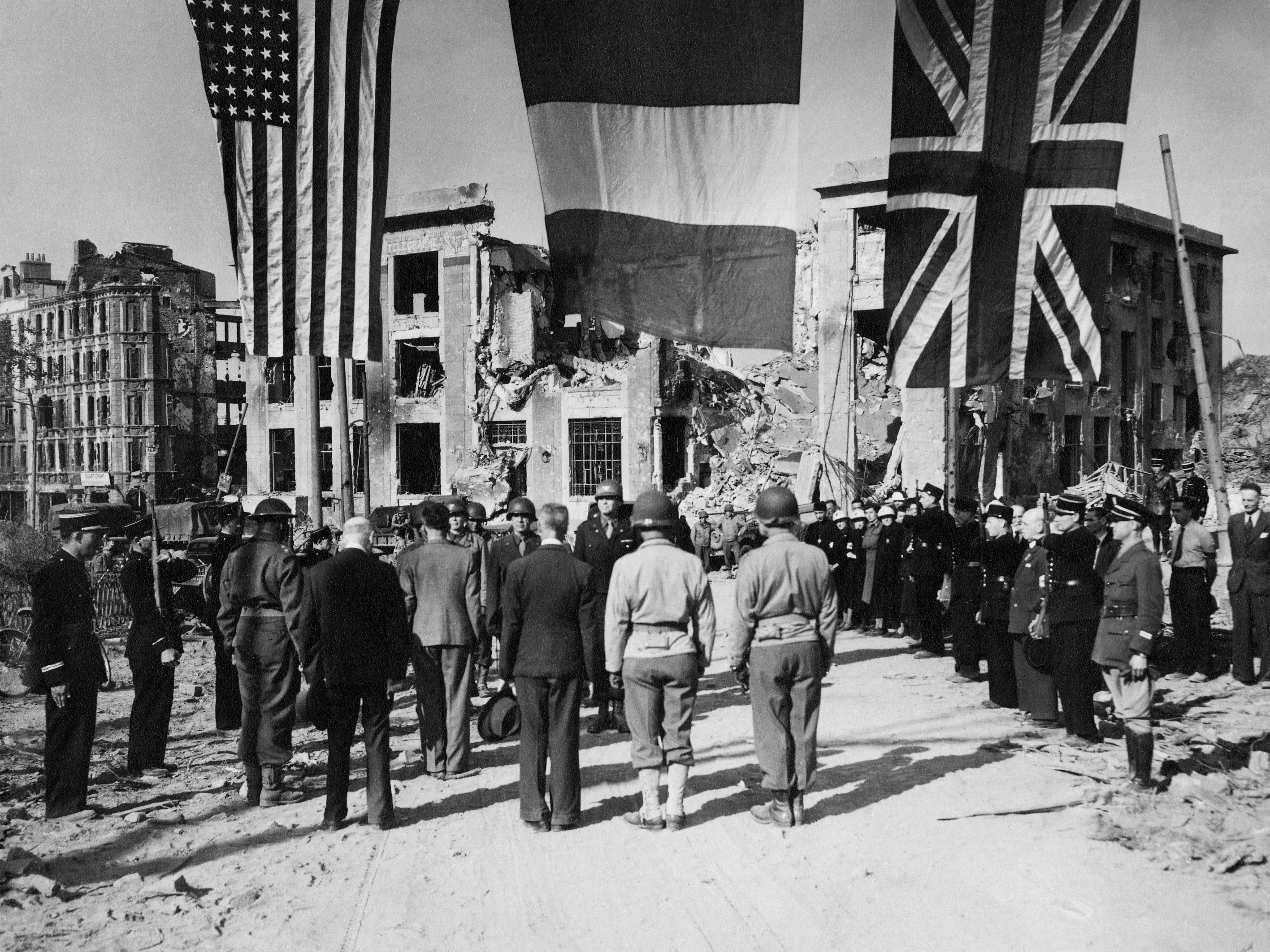 Cette photo est la plus connue de la libération de Brest, car elle figure dans de nombreux livres sur l'histoire de Brest. Elle a été prise par un photographe de l’armée américaine, le 20 septembre 1944, lors de la cérémonie de Remise de la ville par le général américain Troy H. Middleton au maire Jules Lullien. Le lieu de prise de vue est le haut de la rue de Siam. On peut voir en fond la poste en ruine. Les drapeaux des alliés flottent au-dessus des militaires de l’armée américaine et des autorités communales. Scan d'un tirage original avec retouches.